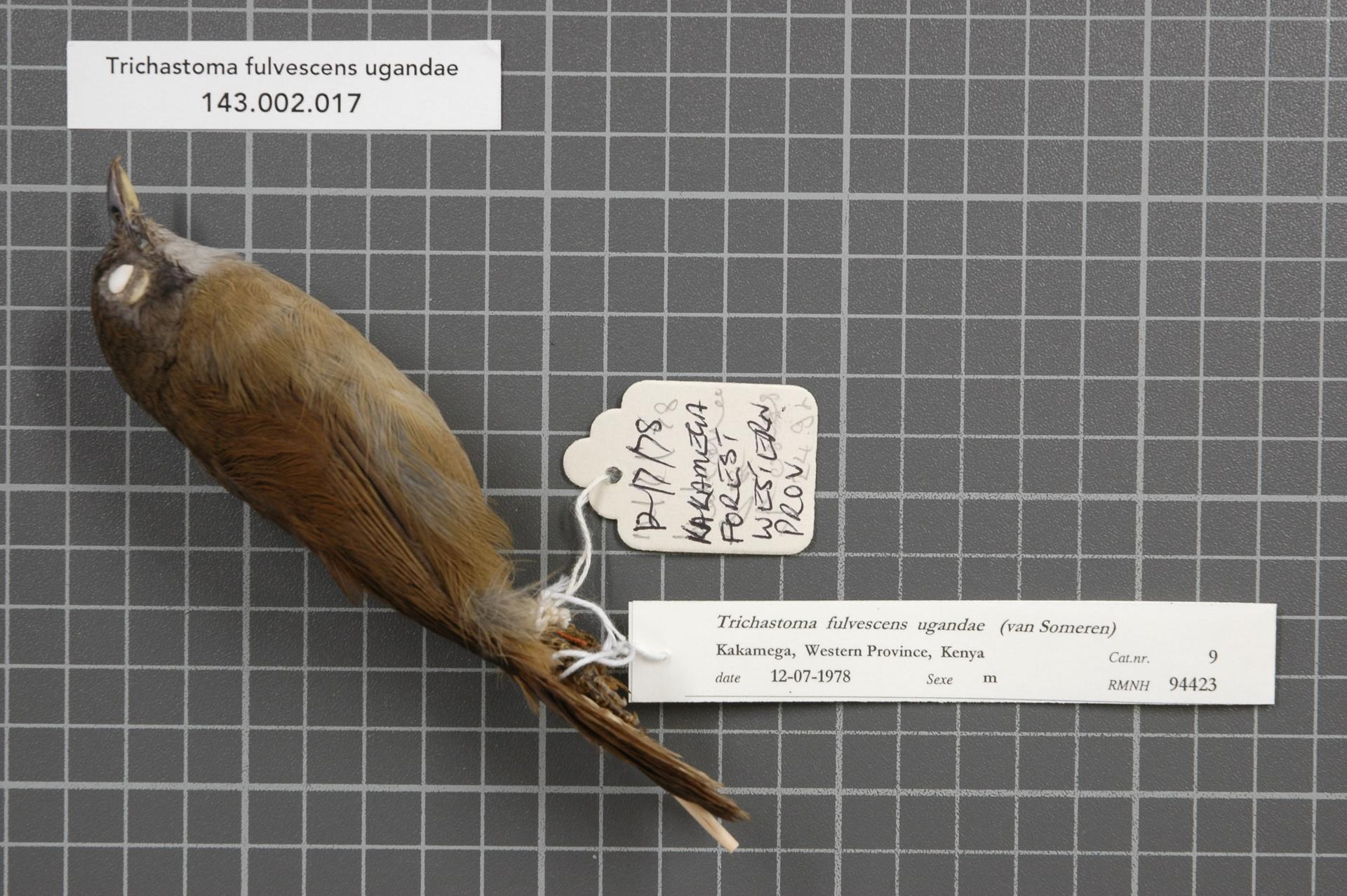 Trichastoma fulvescens ugandae (van Someren, 1915)